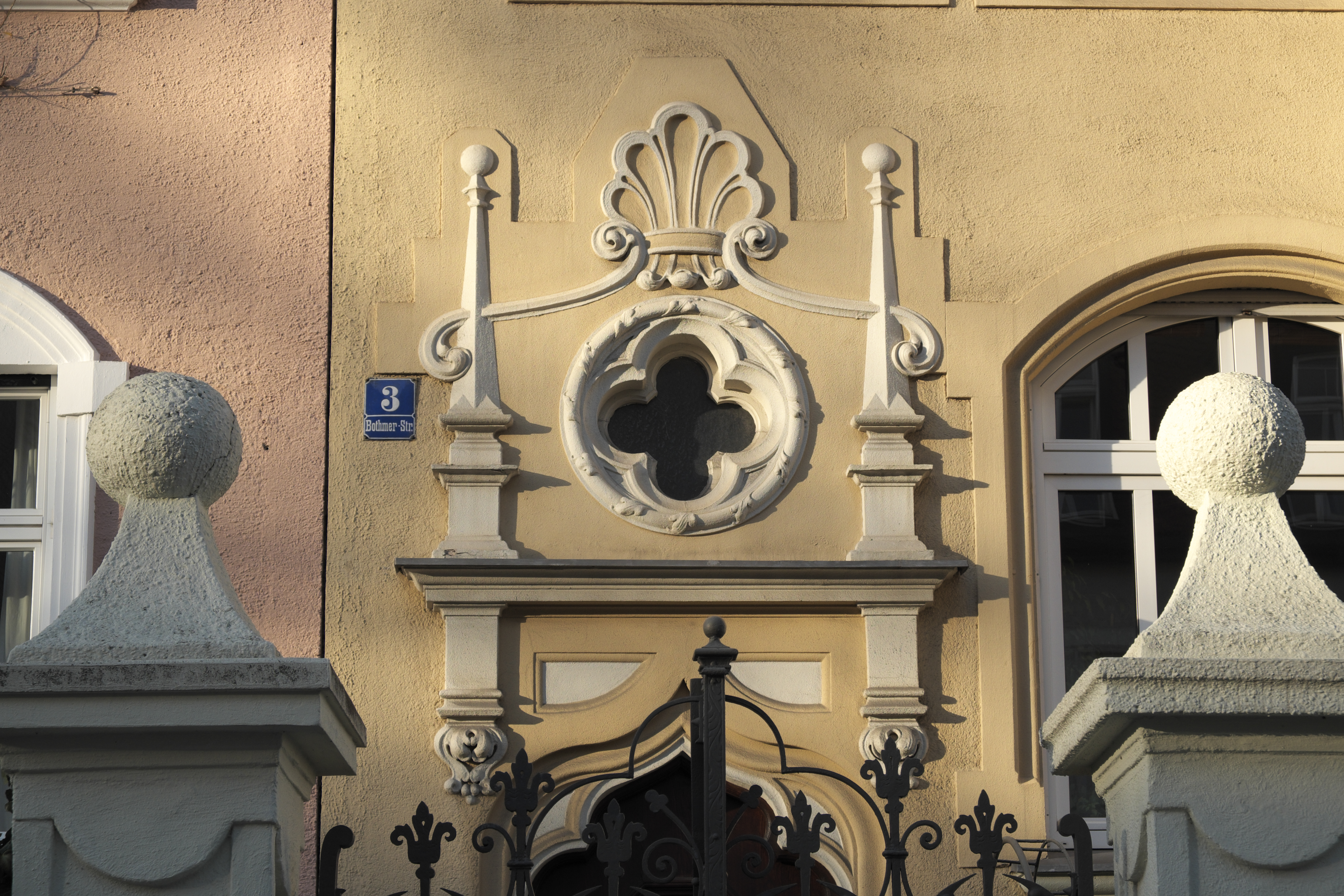 Mietshaus in der Bothmerstraße 3 in Neuhausen im Stadtbezirk Neuhausen-Nymphenburg in München (Bayern/Deutschland)